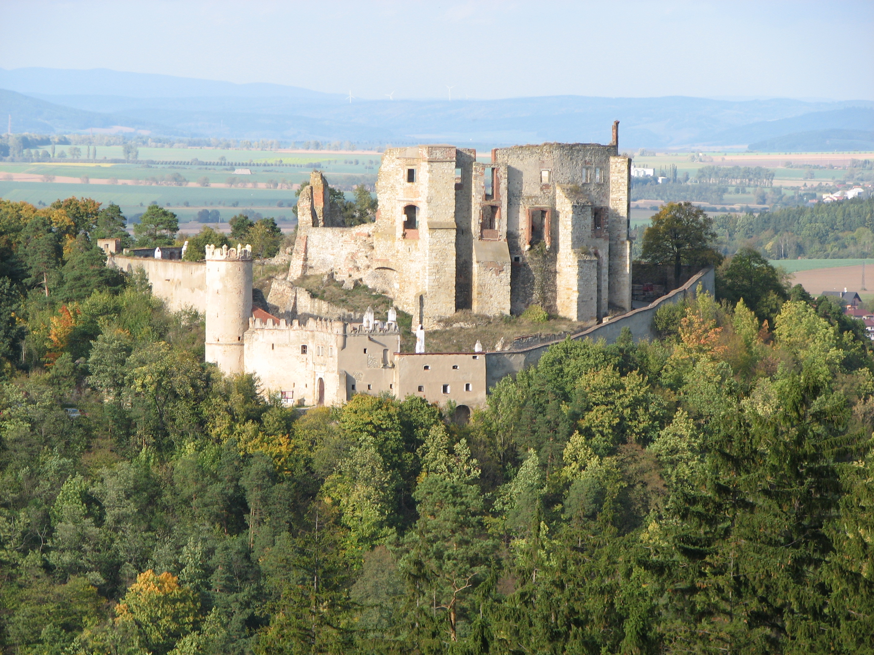 Hrad Boskovice, zřícenina (Boskovice), Hradní 639/7, Boskovice, Boskovice.